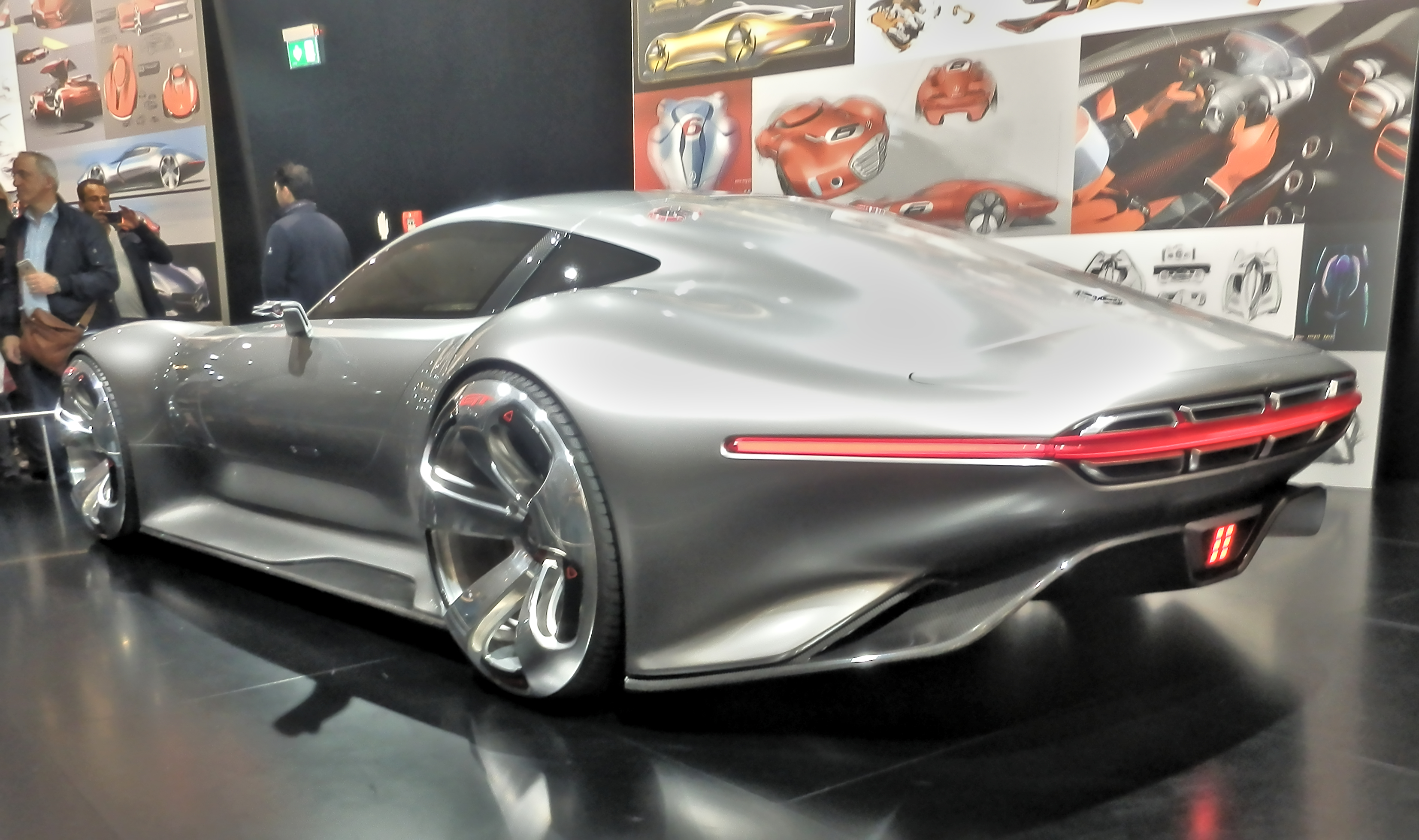 Mercedes-Benz AMG Vision Gran Turismo at IAA 2015